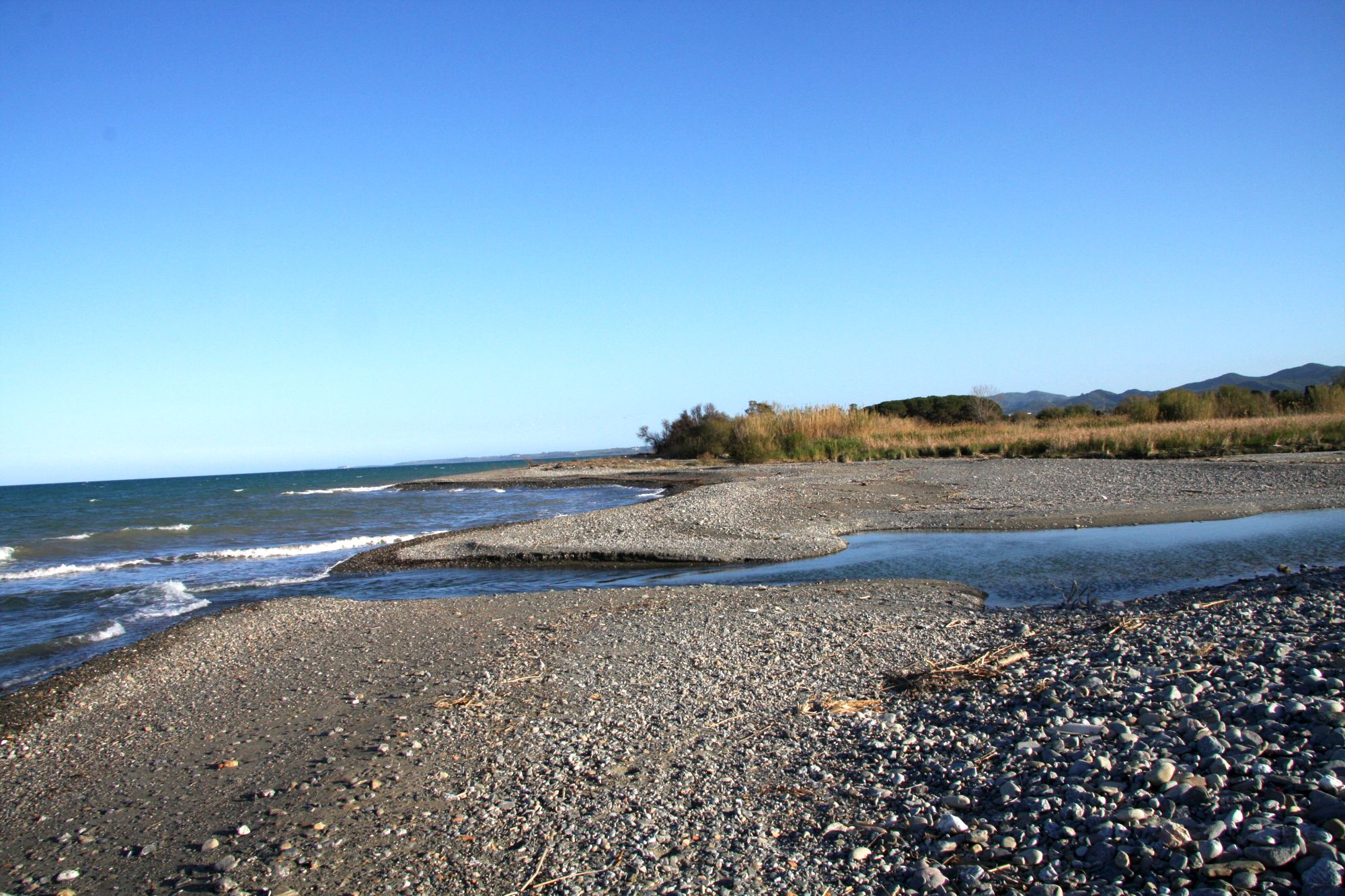 Punto di sbocco del torrente Fiumenicà nel mar Ionio